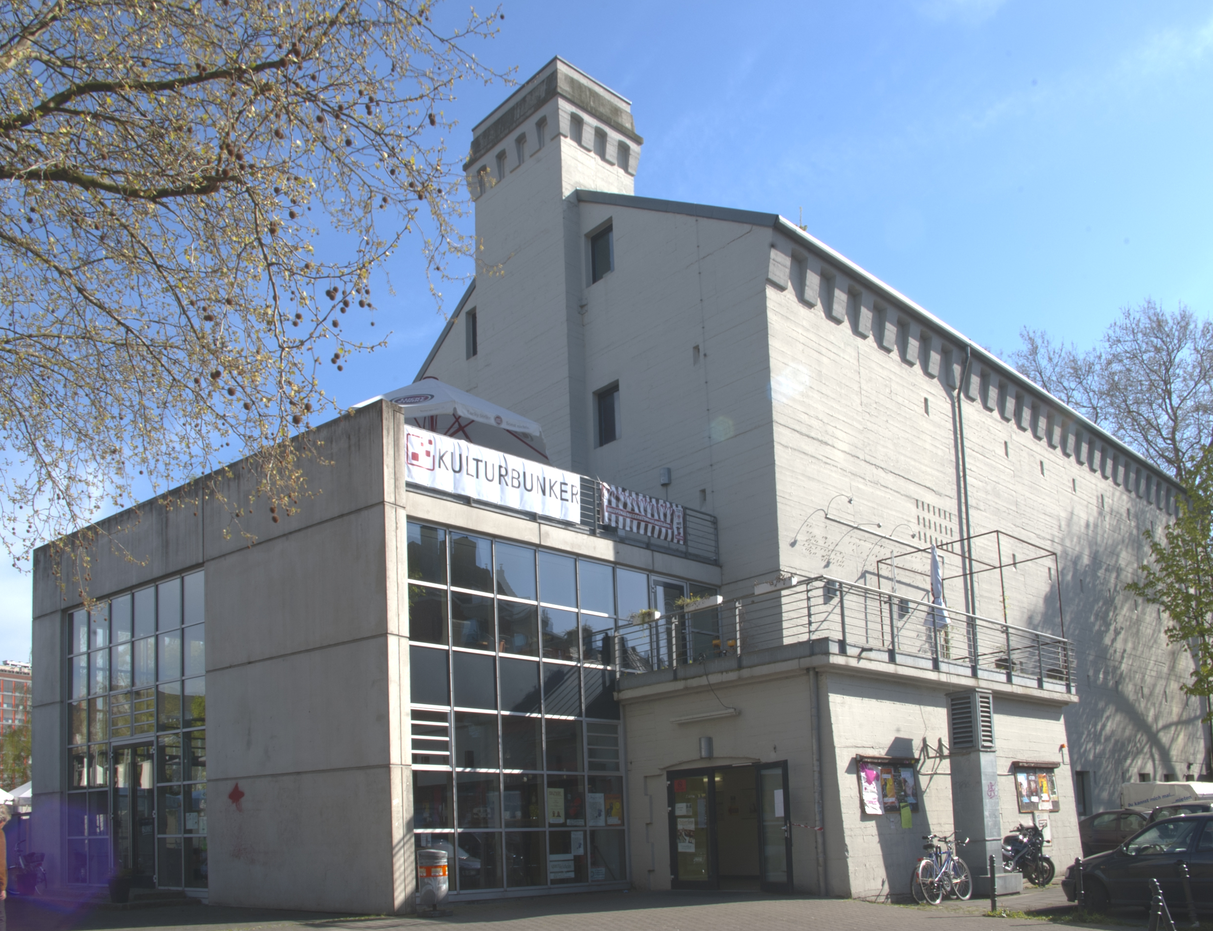 Kulturbunker Köln